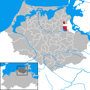 Lüssow in Mecklenburg-Vorpommern - District Nordvorpommern